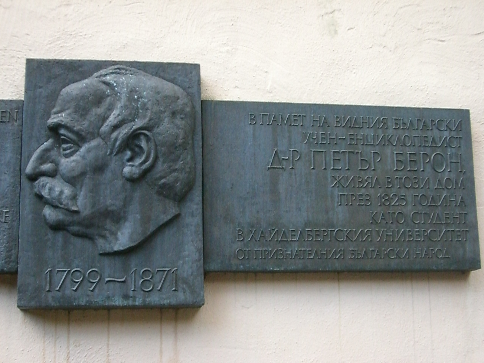 Petar Beron Gedenktafel in Heidelberg